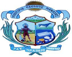 Escudo del Municipio Cacique Manaure del Estado Falcón.